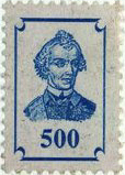 Kupon Transnistria 500 rubles 1992